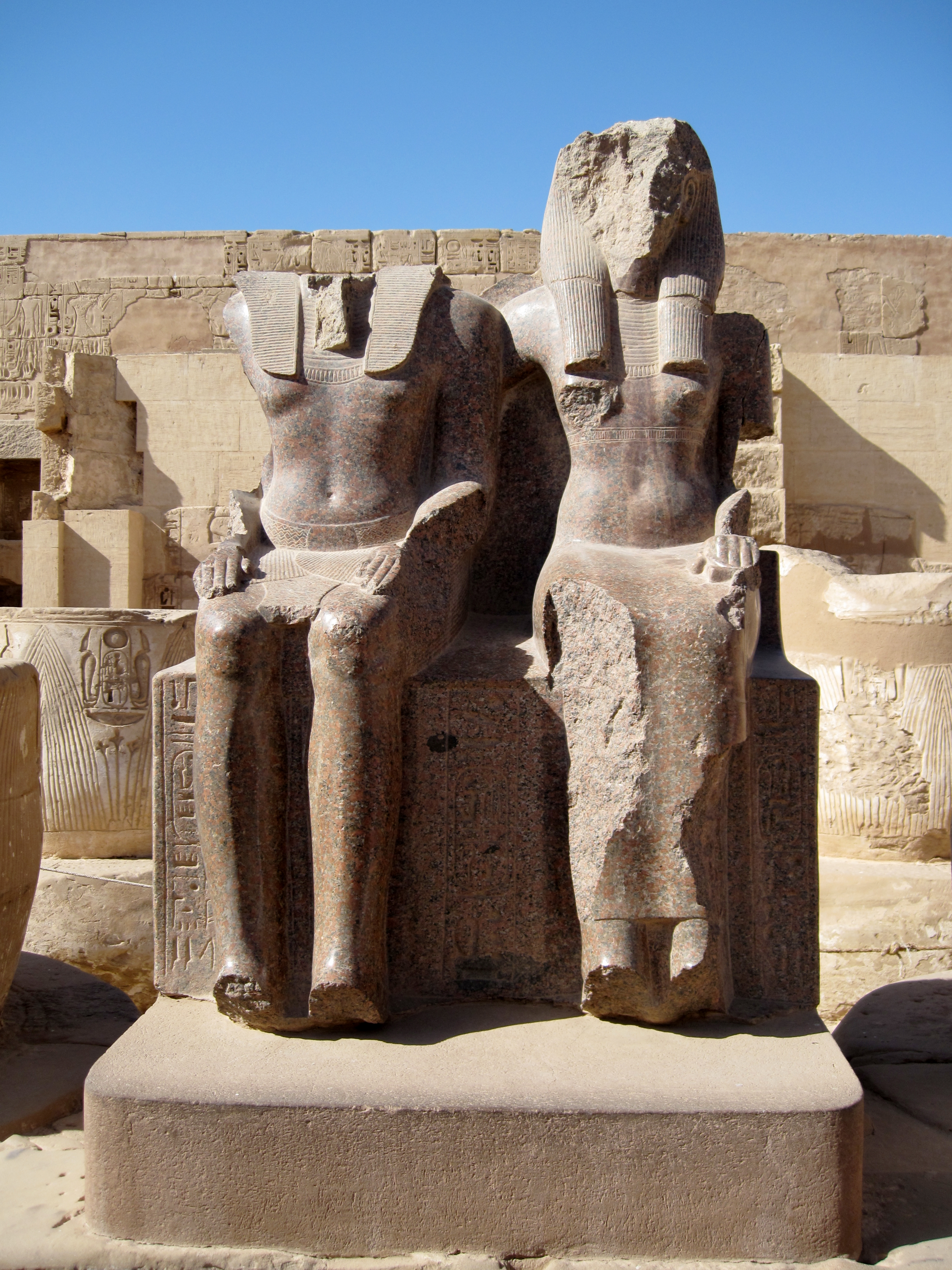 Ramses III. (ursprünglich Amenophis III.) mit der Göttin Maat, Sitzstatuen aus Rosengranit im Totentempel Ramses’ III. in Medinet Habu, Ägypten